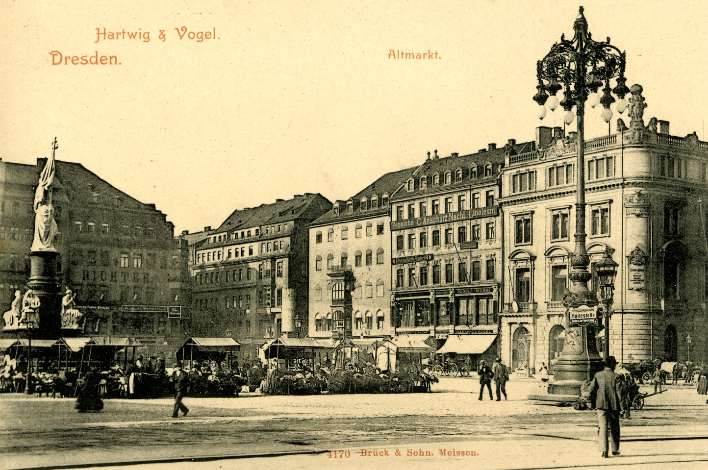 Dresden; Altmarkt This postcard is from publisher Brück & Sohn in Meißen ( postcard has a unique number 04170 and is available in a higher resolution at the publisher. This images was uploaded in a cooperation project between Wikipedians and the publisher.